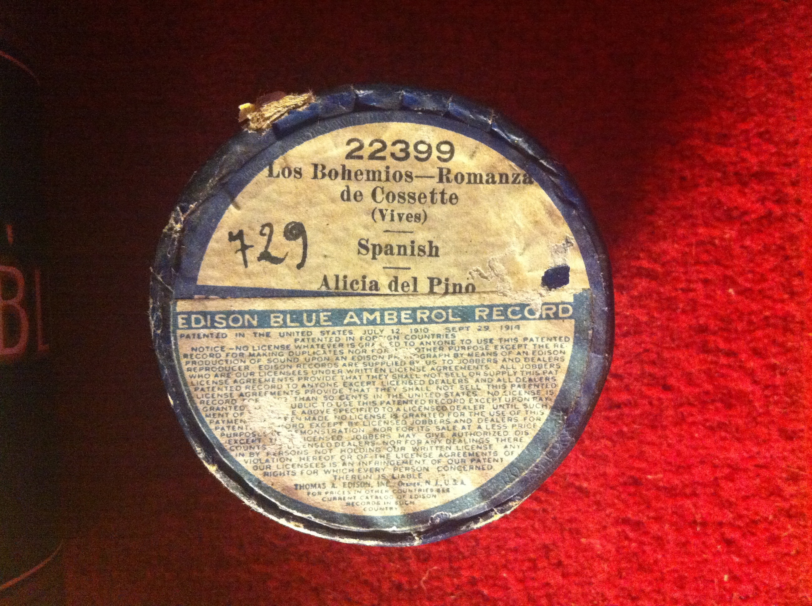 Los Bohemios Romanza Edison Records